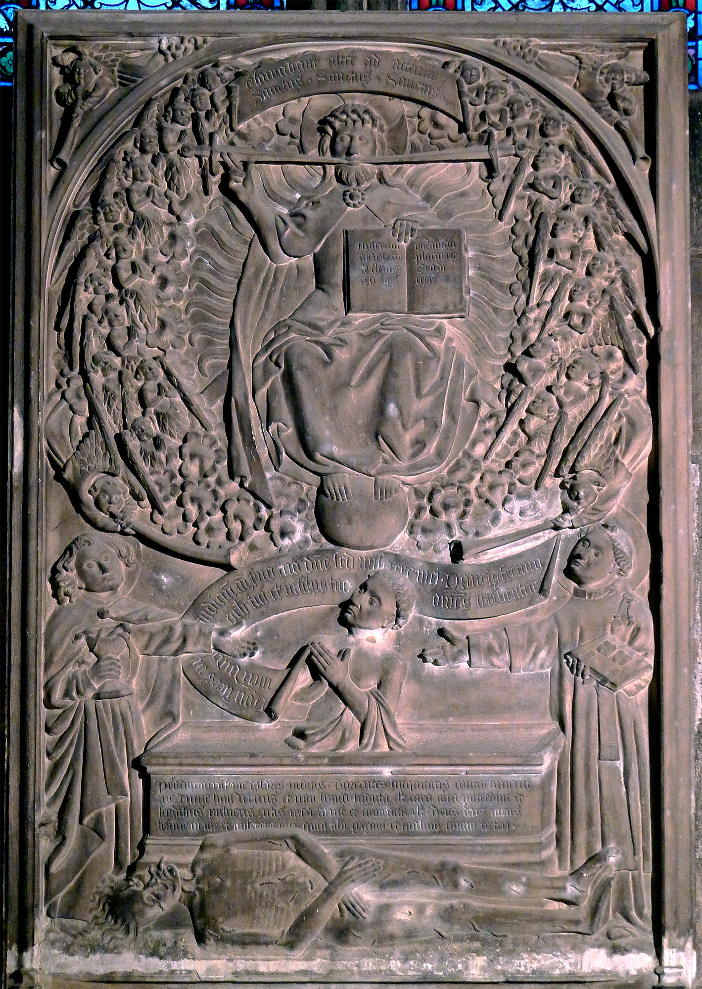 Bas-relief de Notre-Dame-de-Paris - Paris IV